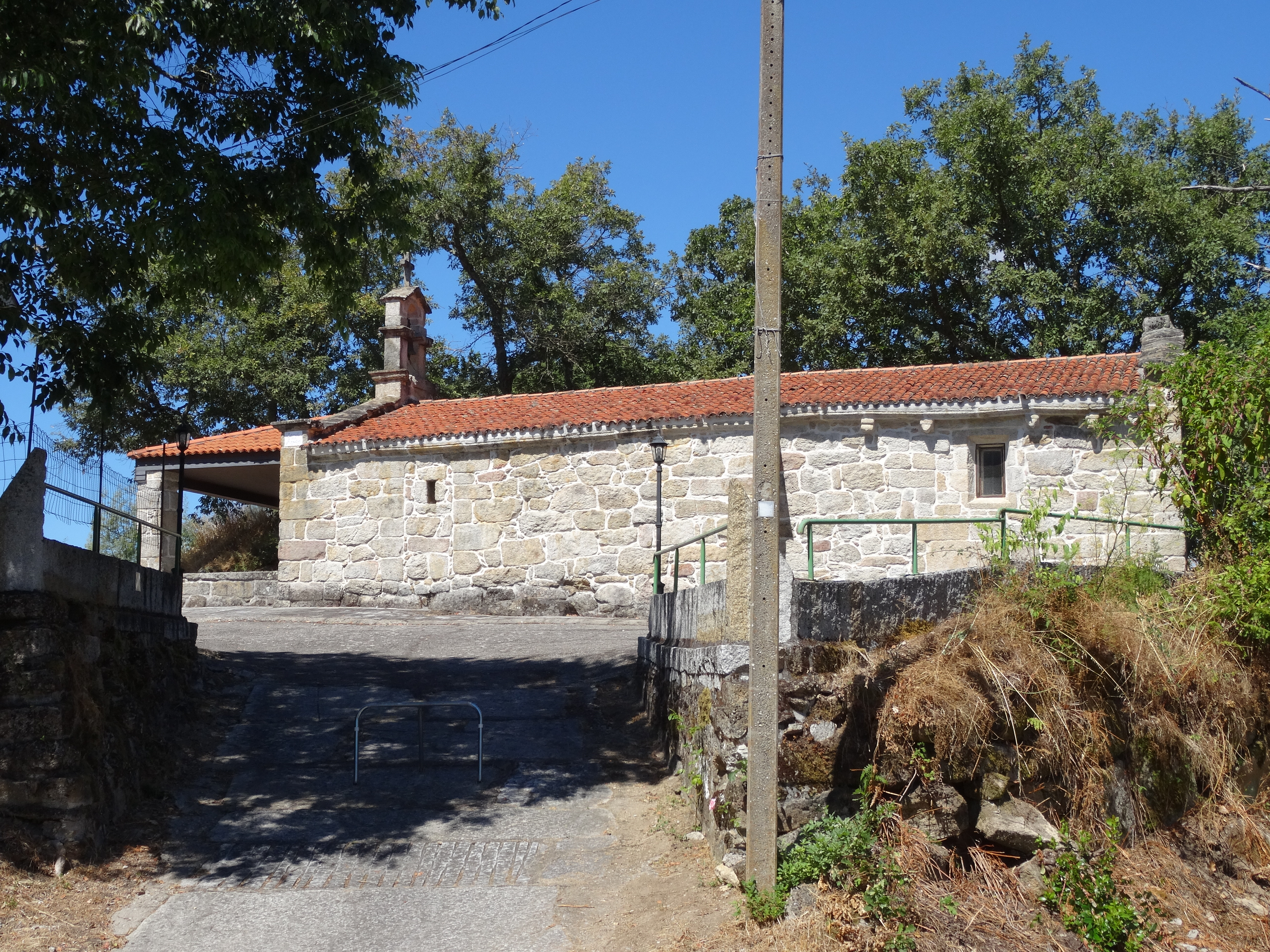 Ver título.